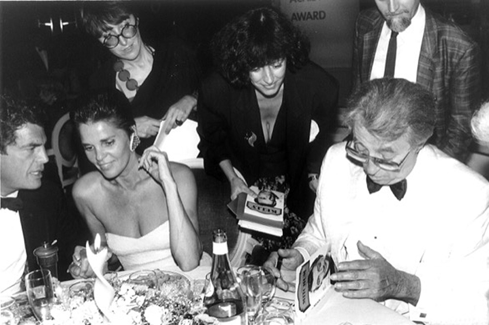 Campione d’Italia - Con gli attori Robert Mitchum e Ali McGrow